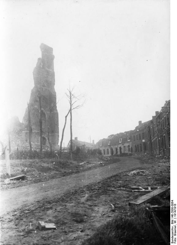 Kirche in Fromelles Kriegsphotograph W. Braemer, Berlin